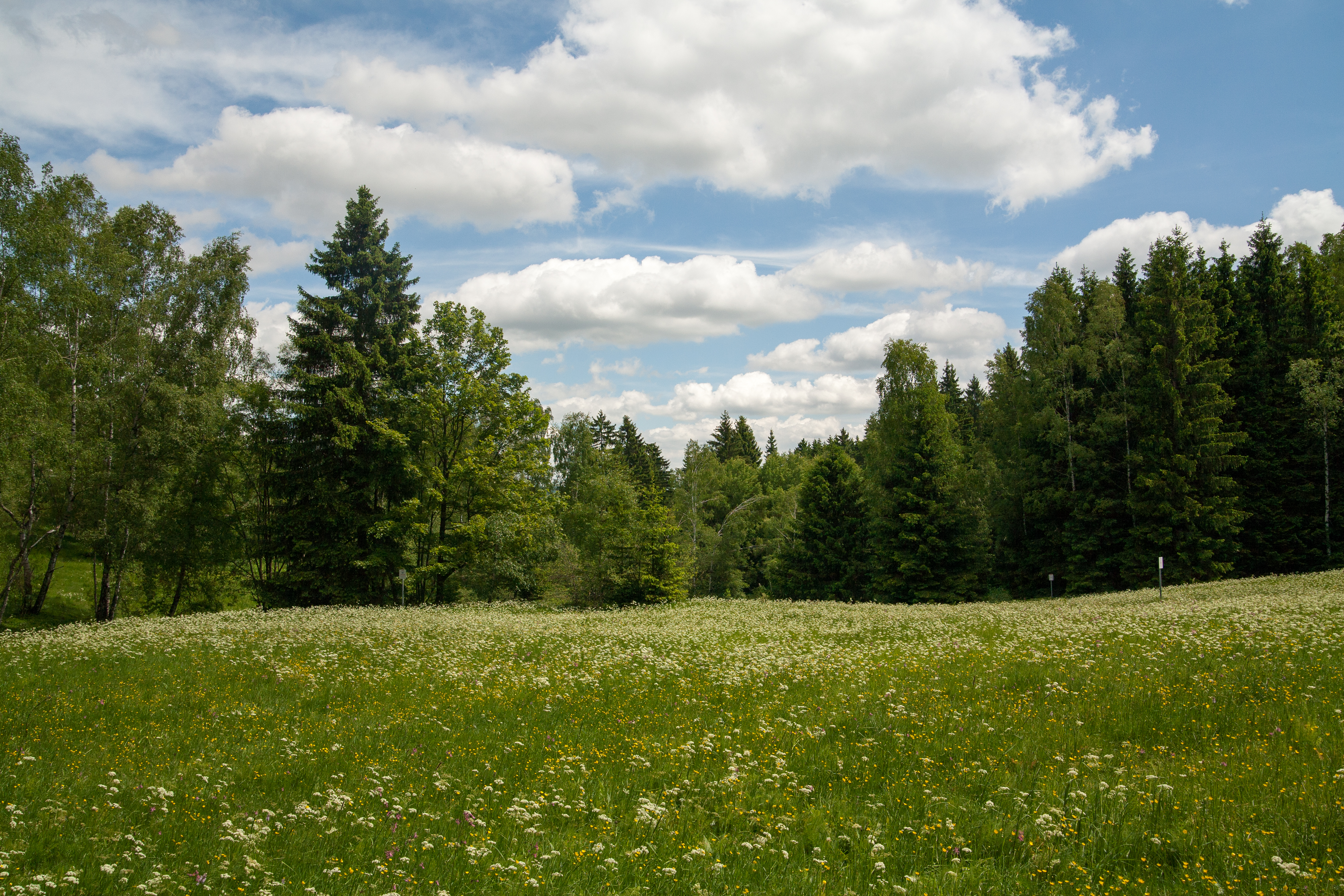 Im oberen Bereich des Naturschutzgebiets "Lohenbachtal" bei Tannenberg. Zur Zeit der Bärwurzblüte fotografiert.